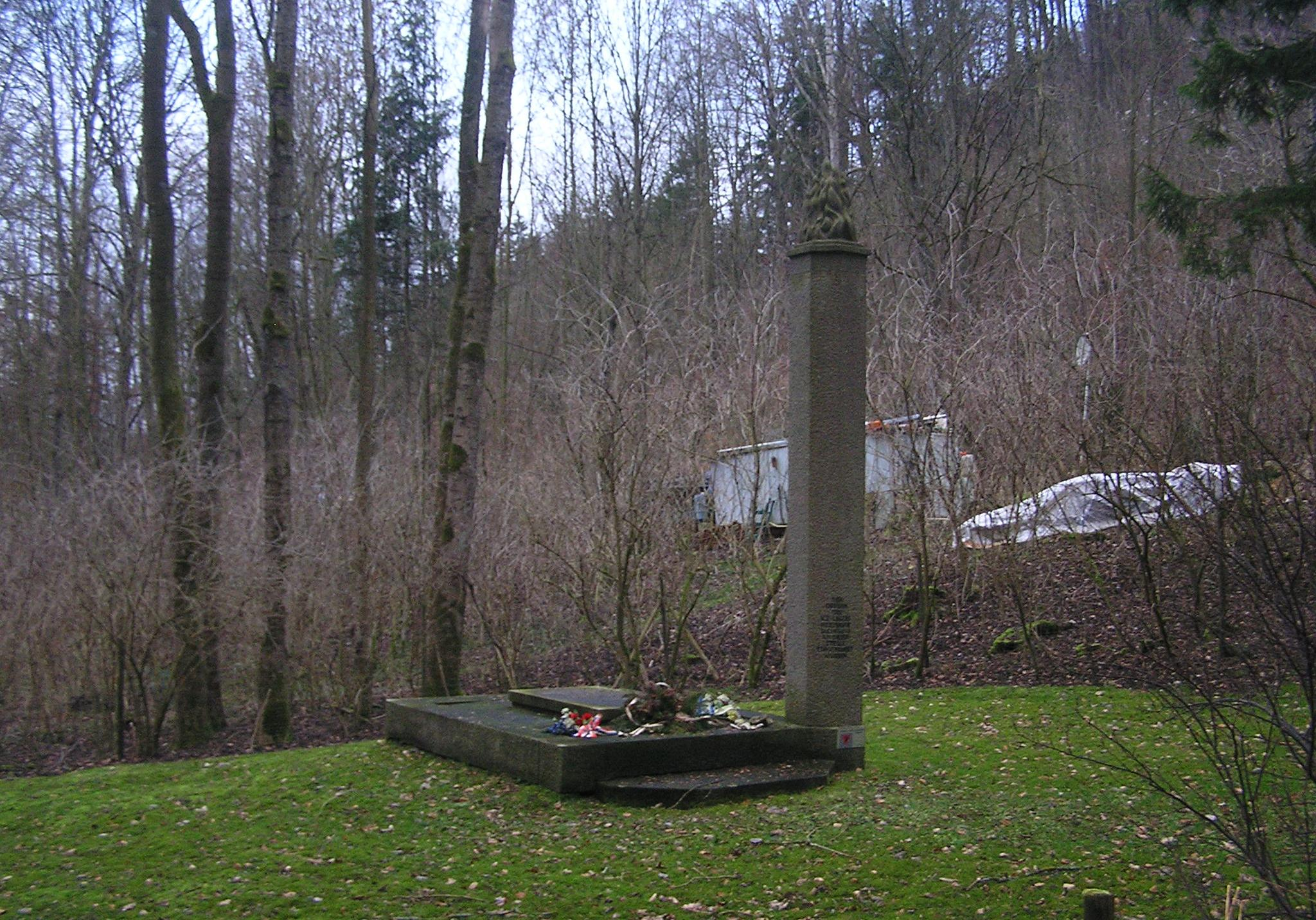 Nahe dem Ort Hubmersberg gelegenes Mahnmal der Opfer des Konzentrationslagers Hersbruck.